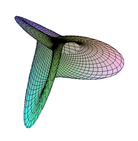 Surface de Boy Paramétrisation de François Apéry : x := cos(s)*(1 - sqrt(2)*sin(s)*cos(s)*sin(3*t))^(-1)*((sqrt(2)/3)*cos(s)*cos(2*t) + (2/3)*sin(s) *cos(t)): y := cos(s)*(1 - sqrt(2)*sin(s)*cos(s)*sin(3*t))^(-1)*((sqrt(2)/3)*cos(s)*sin(2*t) - (2/3)*sin(s)*sin(t)): z := cos(s)*(1 - sqrt(2)*sin(s)*cos(s)*sin(3*t))^(-1)*(cos(s))